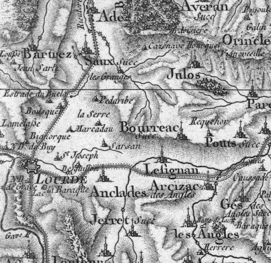 Extrait d'une carte de Cassini établie sous le premier Empire, concernant la ville ou bourg de Lourdes (écrit Lourde).